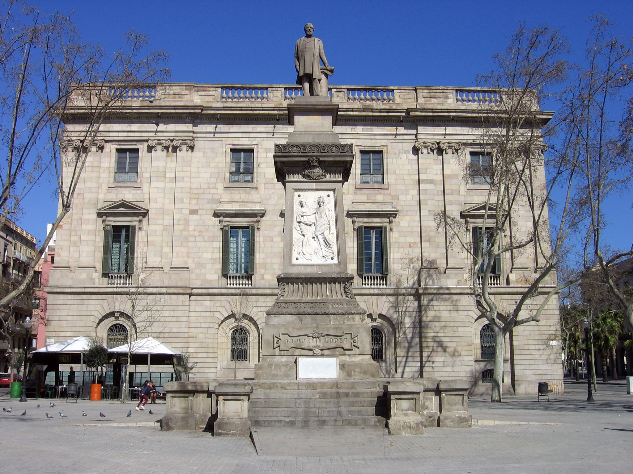 A López y López, Venanci Vallmitjana.